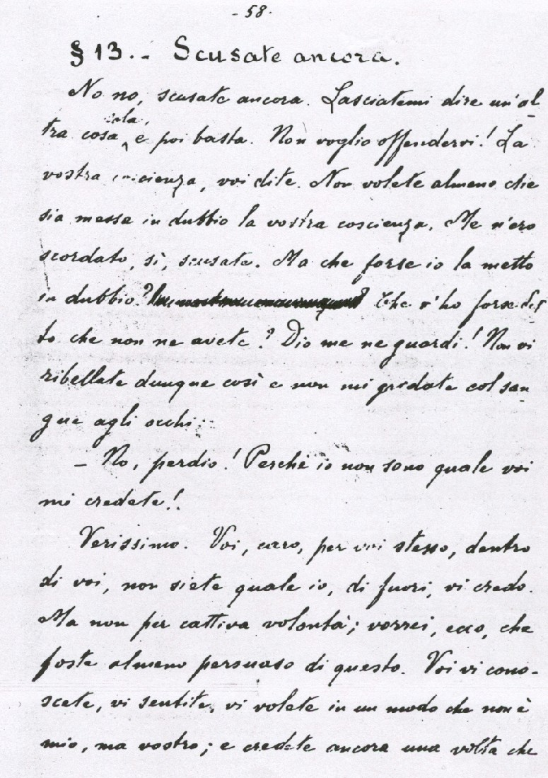 Bozza originale di "Uno, nessuno centomila", capitolo IV. "Scusate ancora", pag. 58